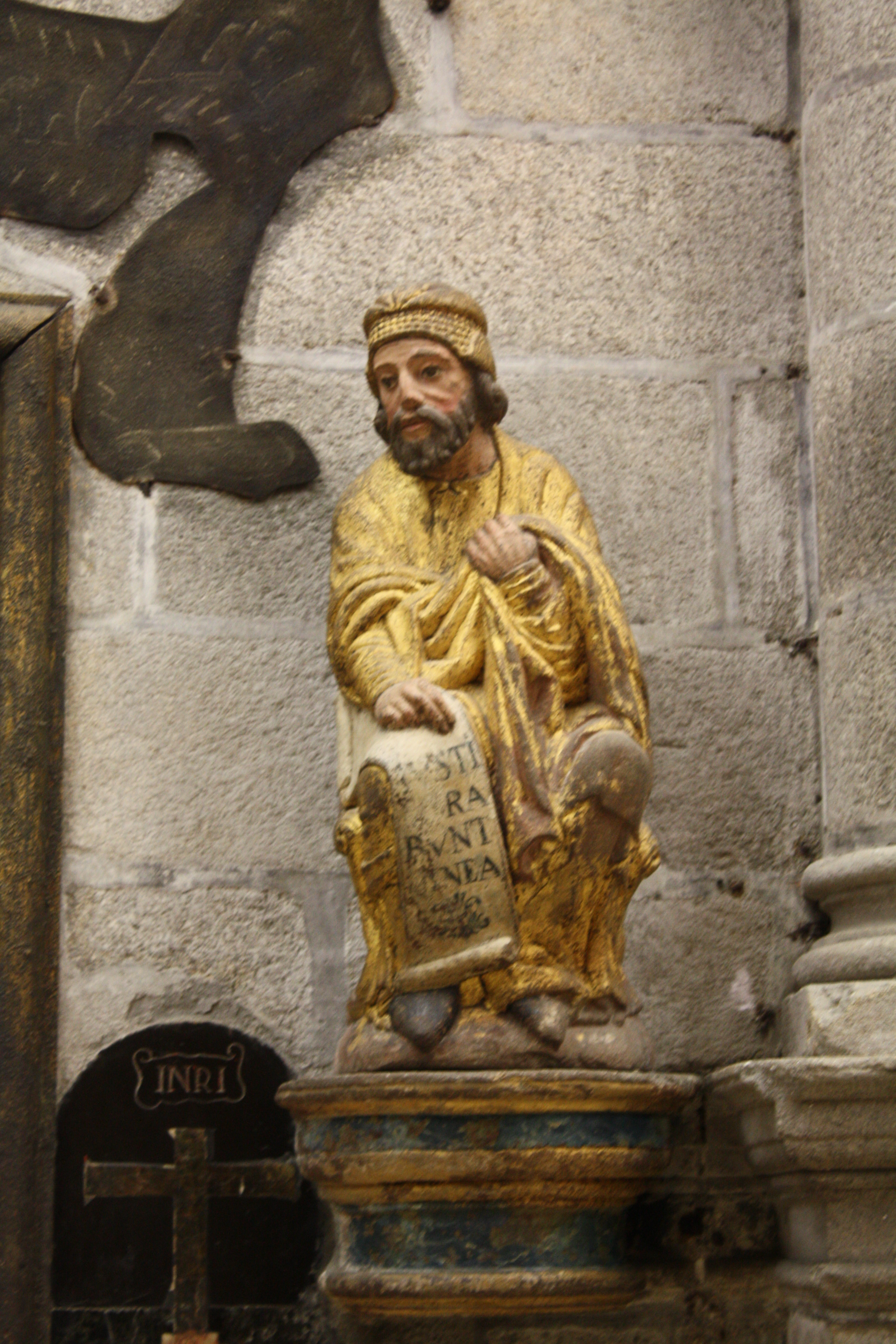 O profeta Ezequiel, no interior da Porta Santa da Catedral de Santiago de Compostela.